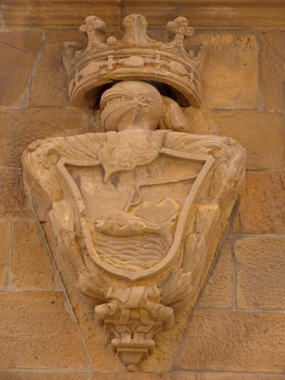 Antiguo Ayuntamiento de Getaria